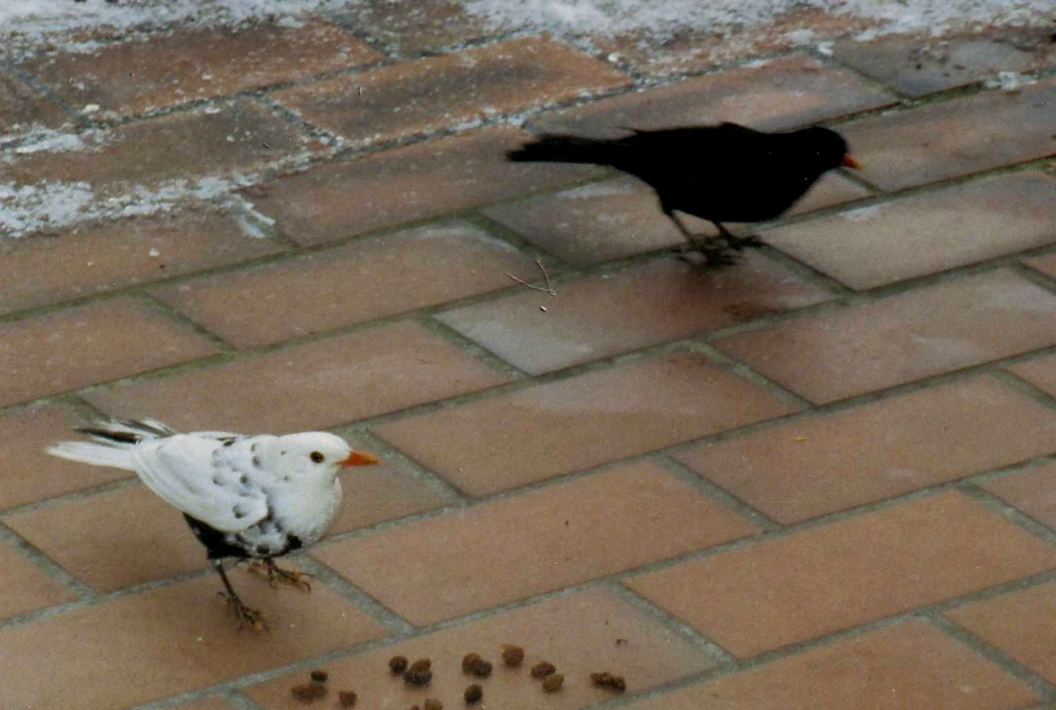 Weiße Amsel 2005